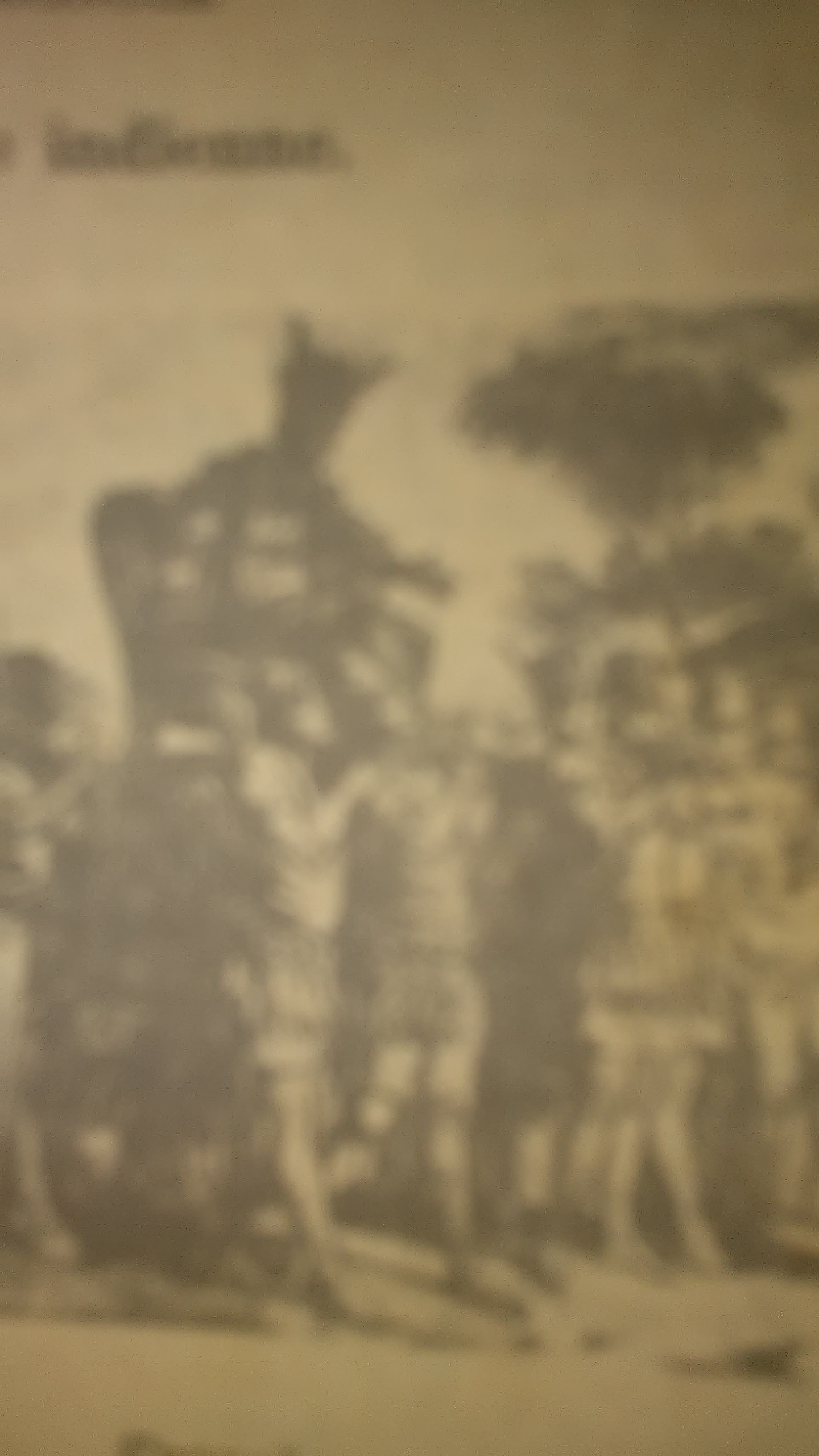 Kreyòl ayisyen : Kaónabo pou avynihi race rwougjy la.